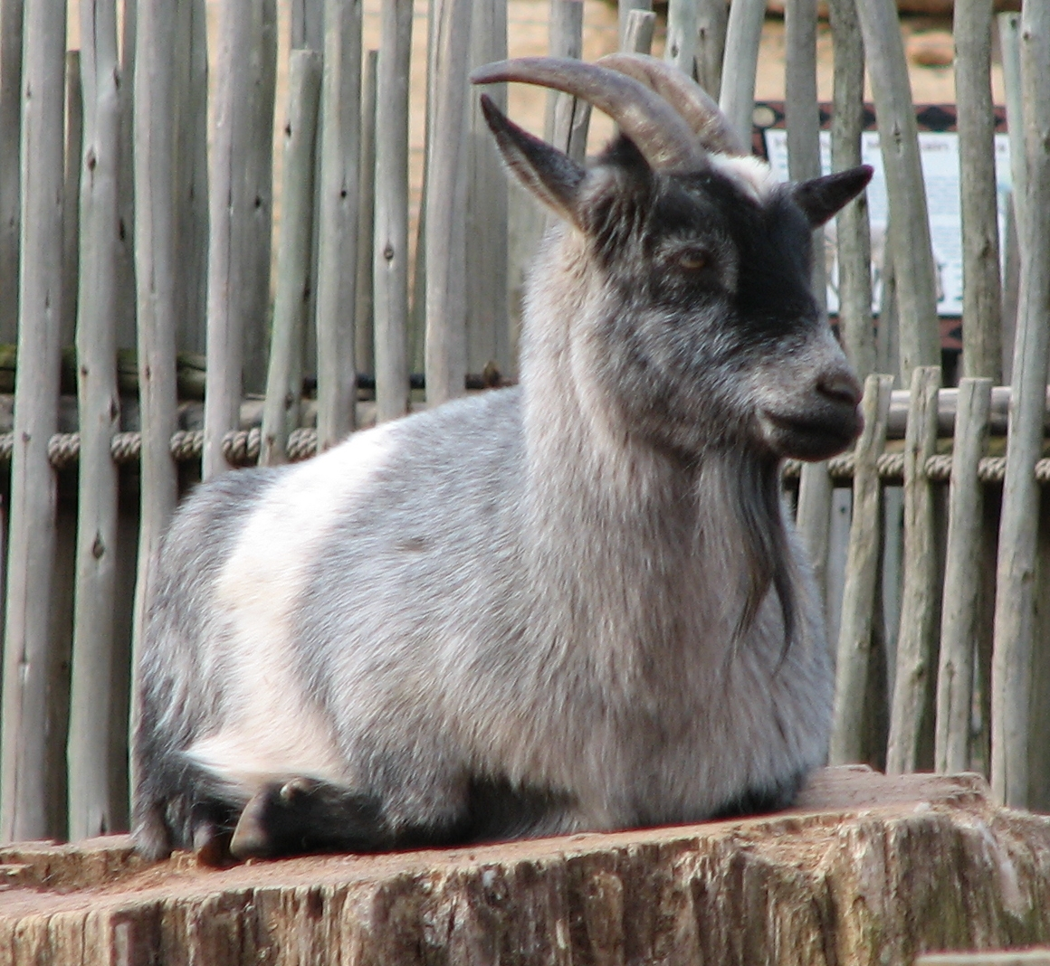 Nigerian Dwarf Goat